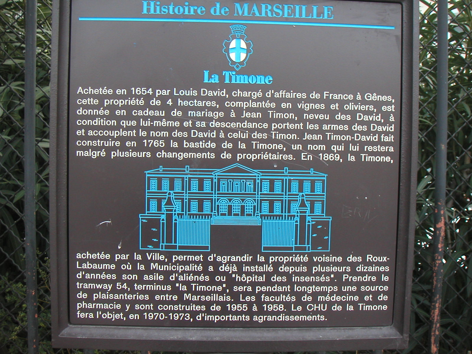 Photo du panneau touristique se trouvant près de l'hôpital de la Timone (angle Bd Jean Moulin - rue St Pierre) à Marseille.